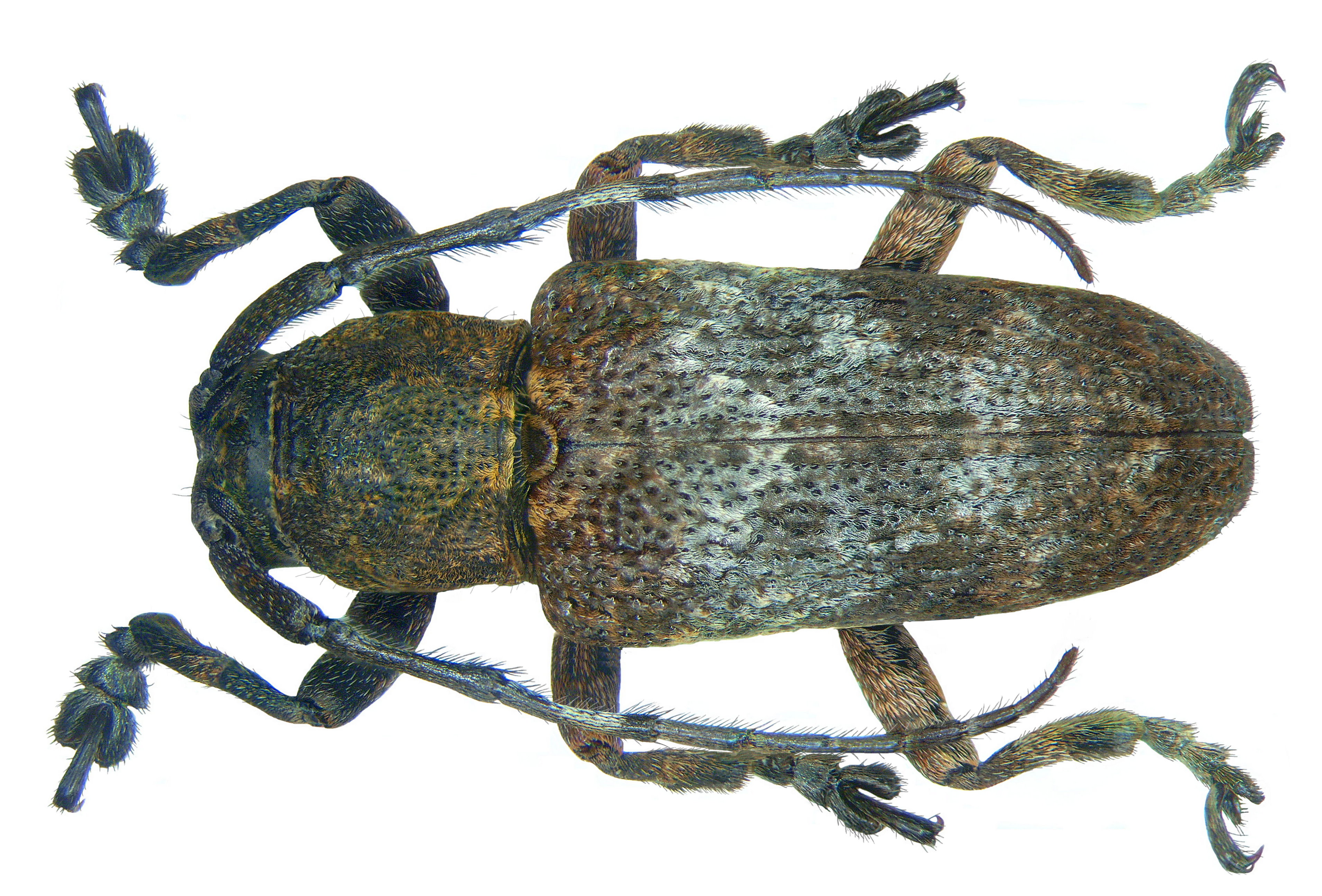 Familie: Cerambycidae Grösse: 14,3 mm Fundort: Thailand, Prov. Phang Nga, Khao Lak leg. U.Schmidt, 2007; det. A.Weigel, 2007 Foto: U.Schmidt, 2008